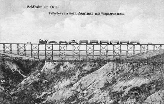 Feldbahn im Osten; Talbrücke im Schluchtgelände mit Verpflegungszug (Feldbahn Bełżec–Trawniki)